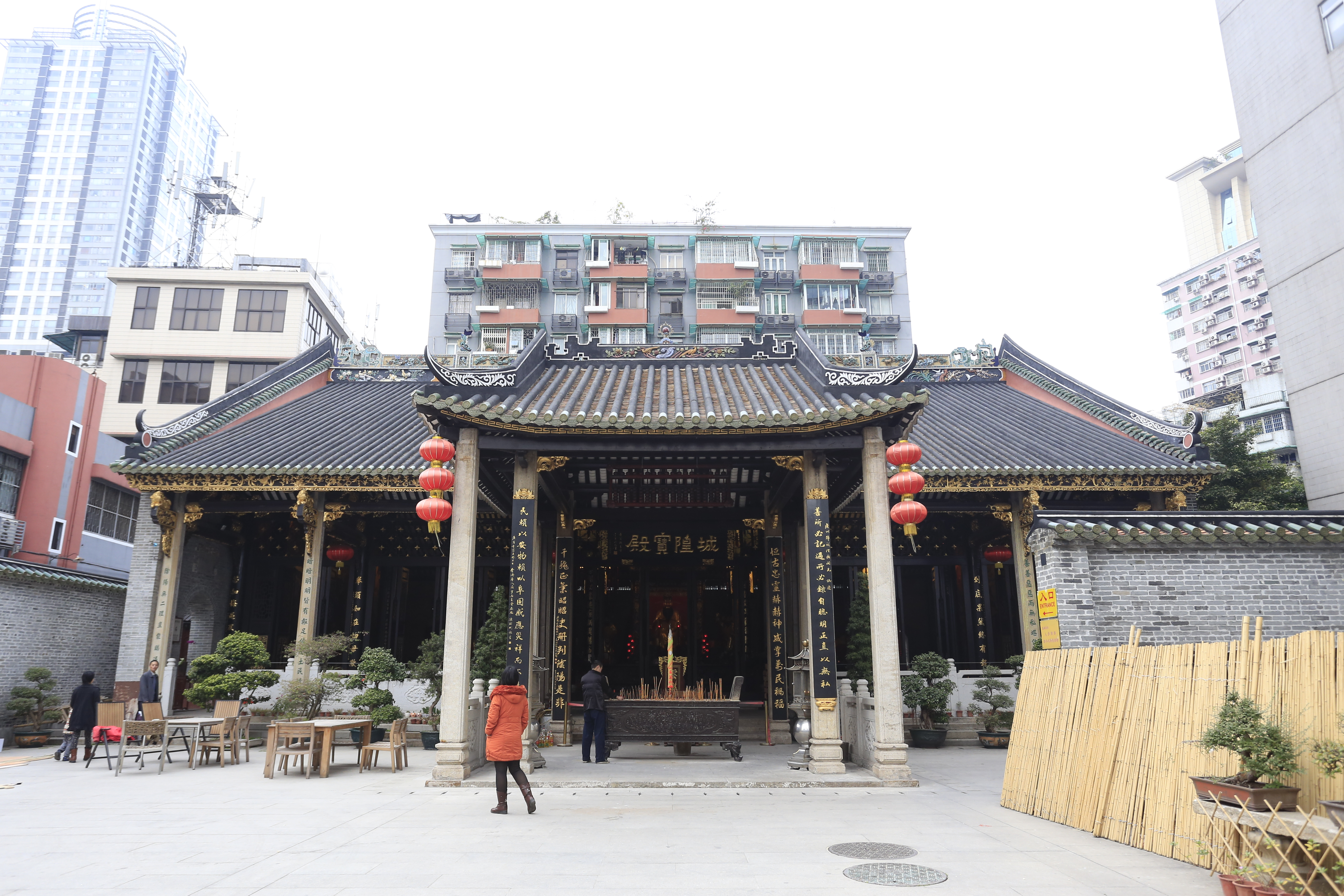 广州都城隍庙 正殿和拜亭